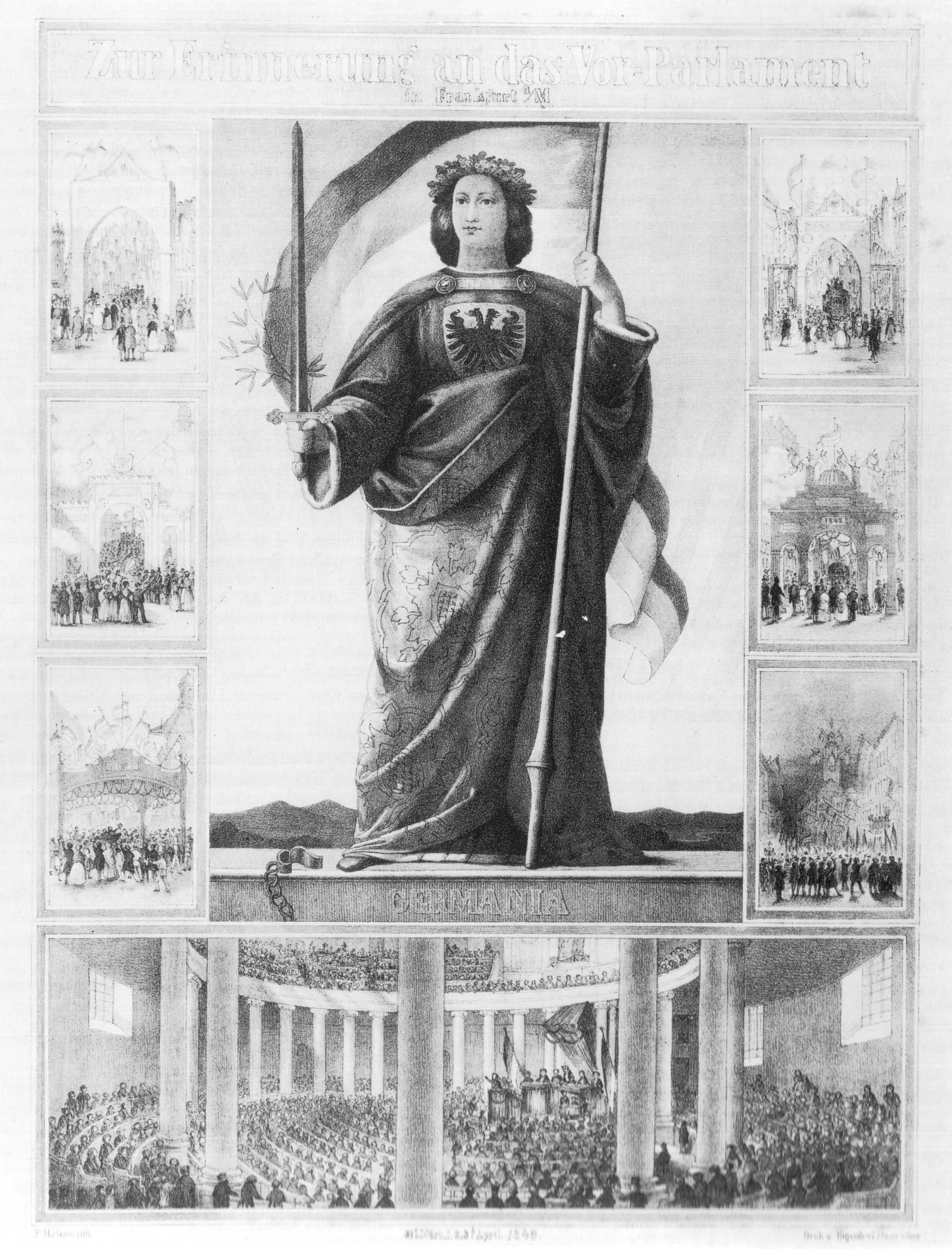 Lithographie von Franz Heister, 1848. Zur Erinnerung an das Vorparlament.